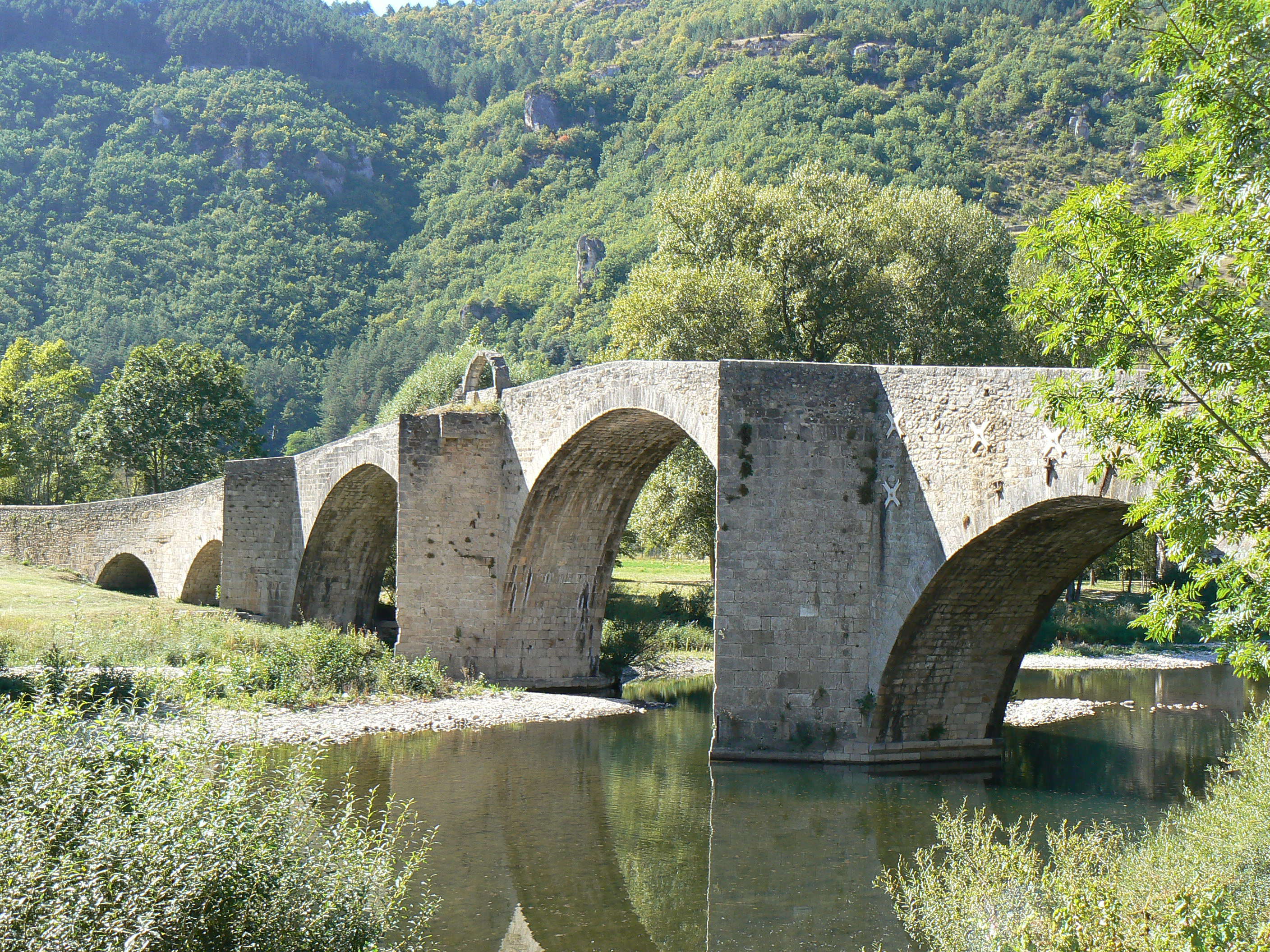 Pont sur le Tarn de la commune de Quézac en Lozère